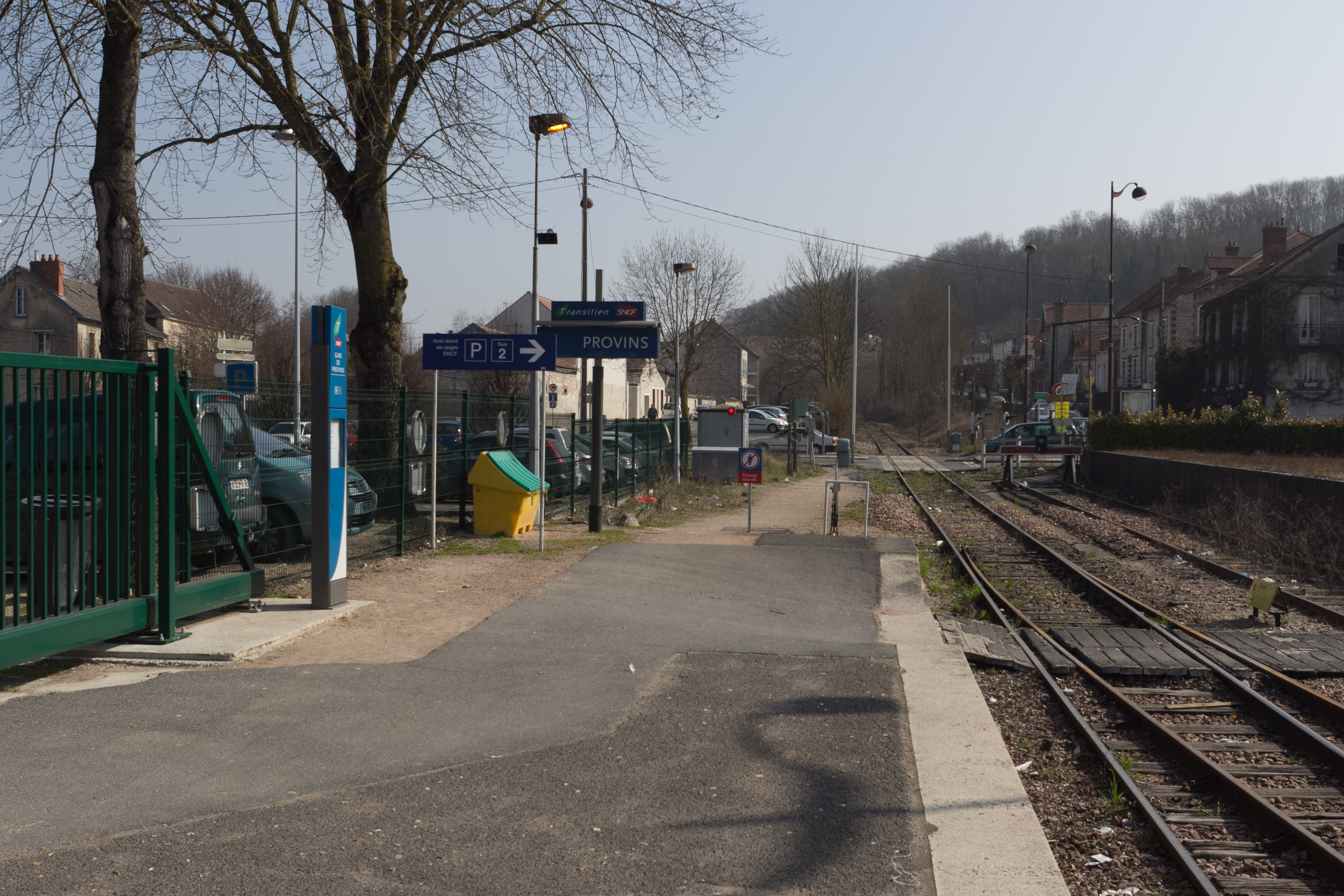 Gare de Provins, Provins, département de Seine-et-Marne, France